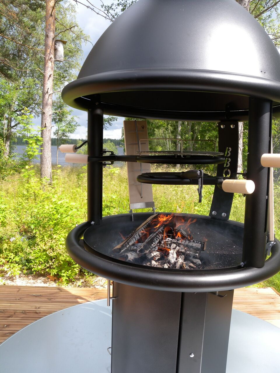 BBQ ir unikāls ar savu moderno dizainu un praktisku lietošanu. Pateicoties, regulējamajam mehānismam, ēdienu gatavošana ir vel vieglāka. Ar mehānisms palīdzību viegli varēs pieregulēt gatavošanas temperatūru. Ražo Opa Muurikka Ltd.